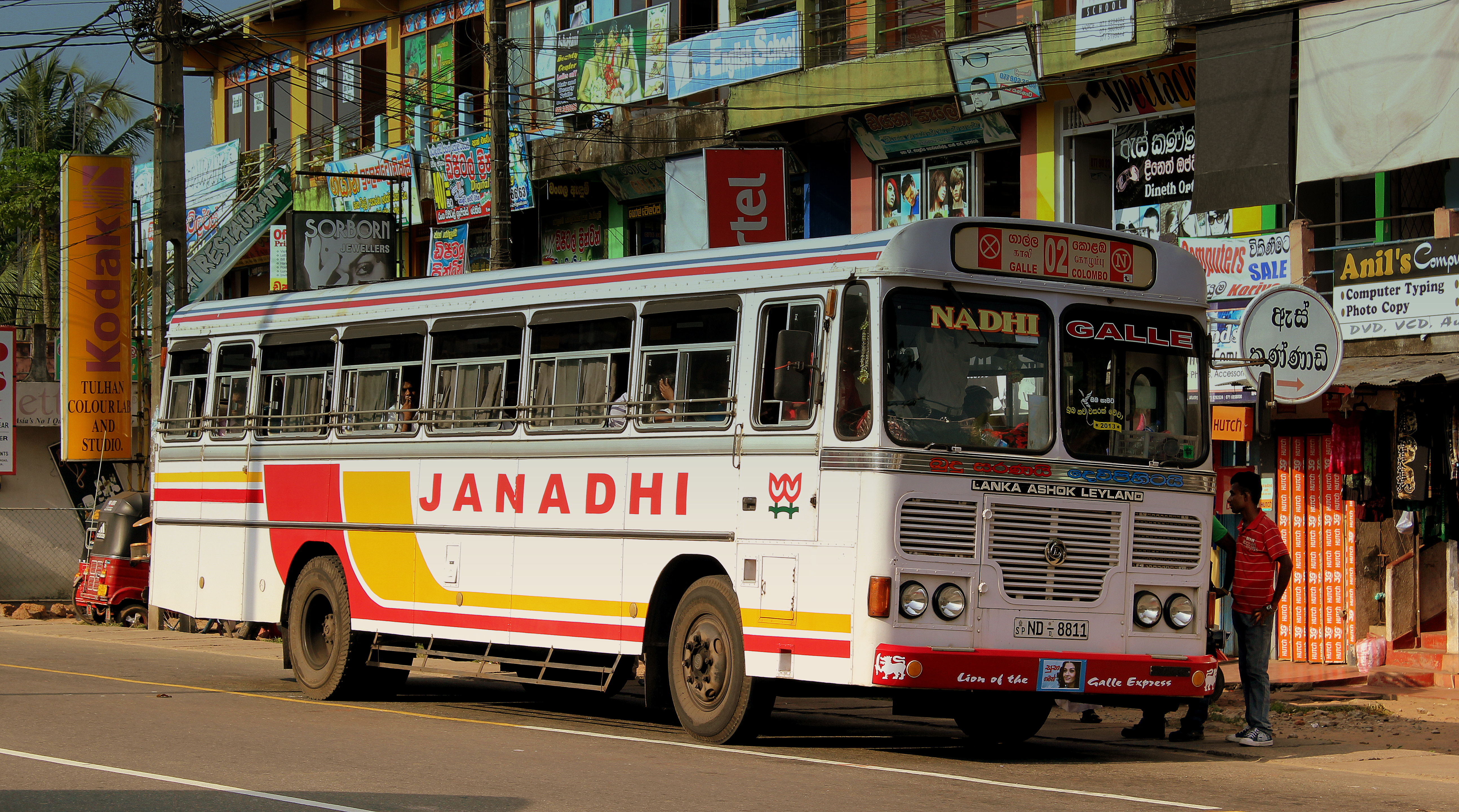 LANKA ASHOK LEYLAND BUS OPERATED BY JANADHI TRAVELS AT BENTOTA BUS STATION BOUND FOR GALLE SRI LANKA JAN 2013